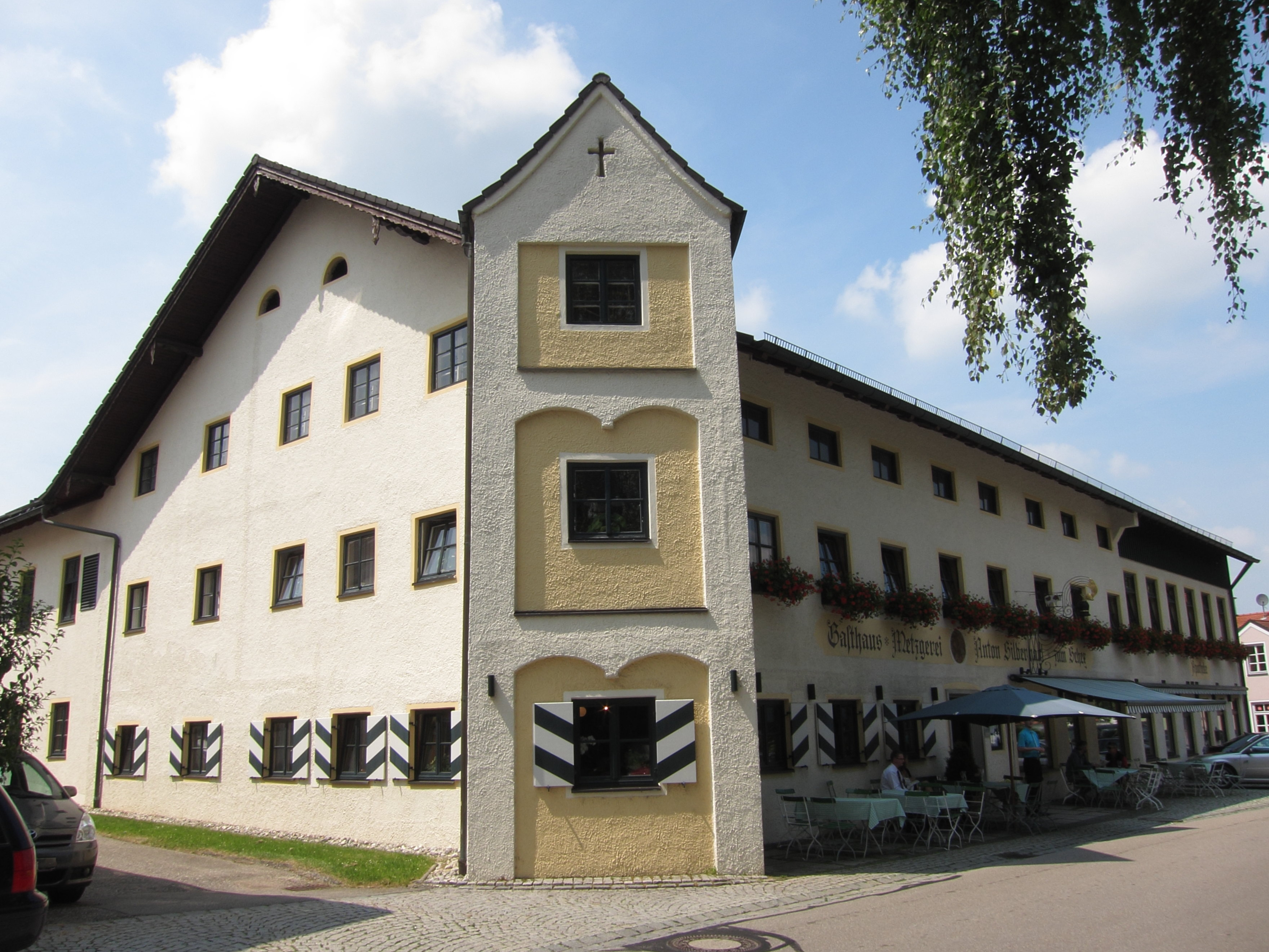 Hofmarkstraße 1; Gasthaus zum Schex, zweigeschossiger Satteldachbau mit Halbgeschoss, Eck-Bodenerker und Stichbogenfriesen, Gaststube mit bemerkenswerter Balkendecke, zweite Hälfte 16. Jahrhundert.